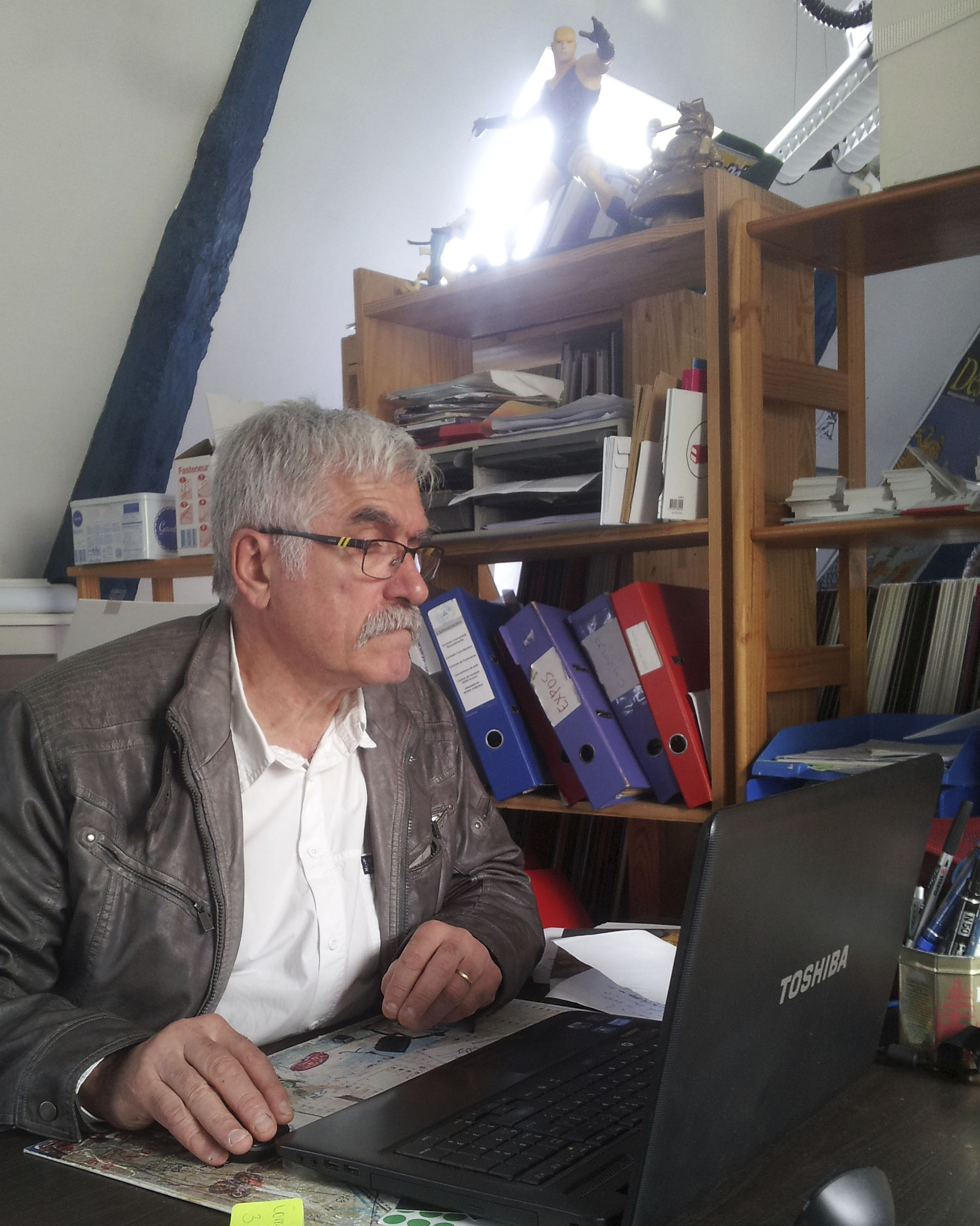 Gégé dans les bureau de Quai des Bulles 2015